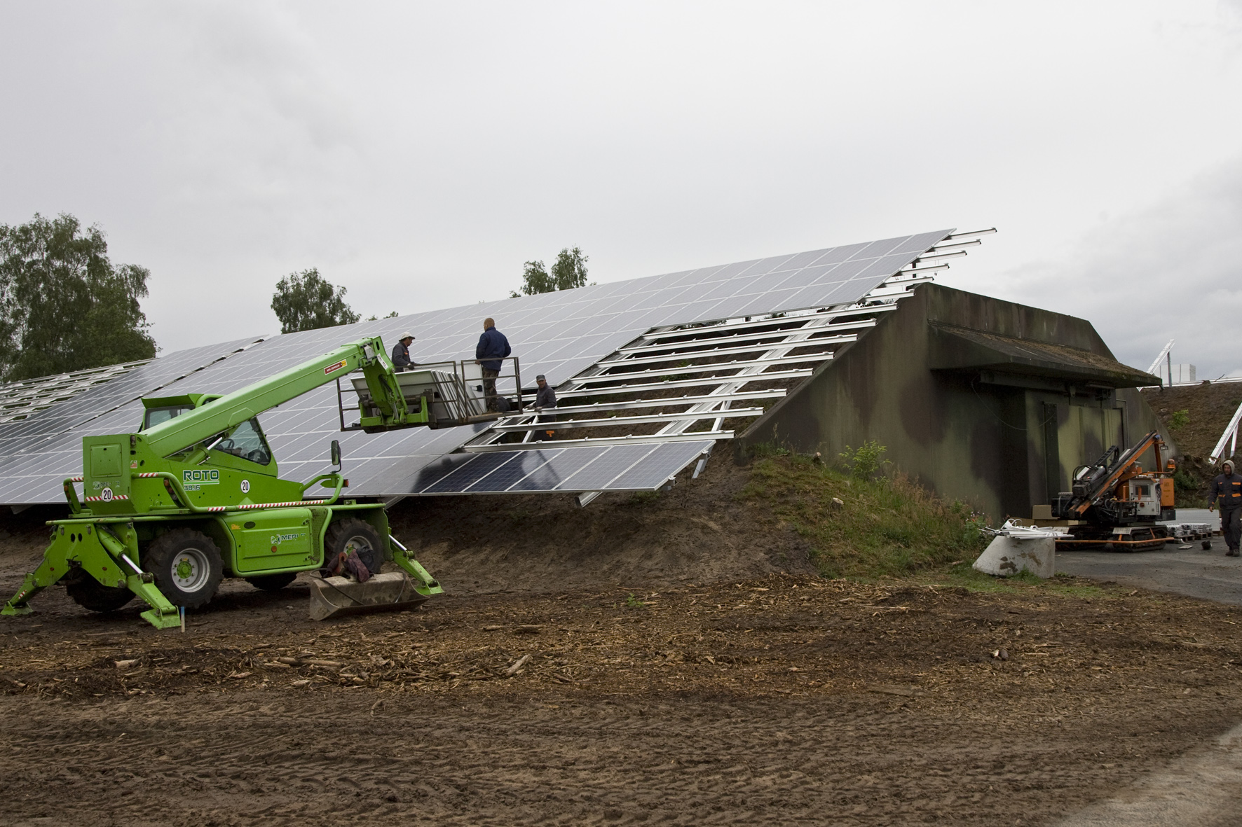 Solarmodule werden auf den Bunkern im Bioenergiepark Saerbeck installiert